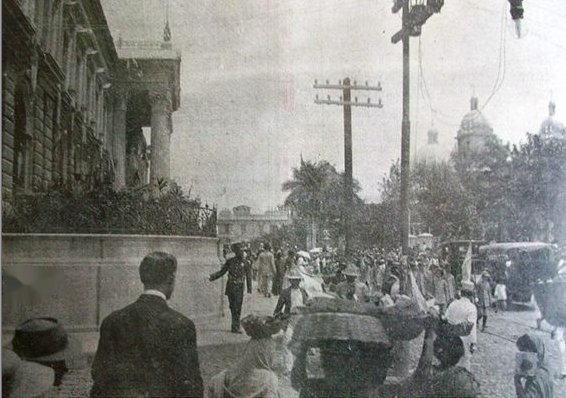 Centro de San Salvador, 1915